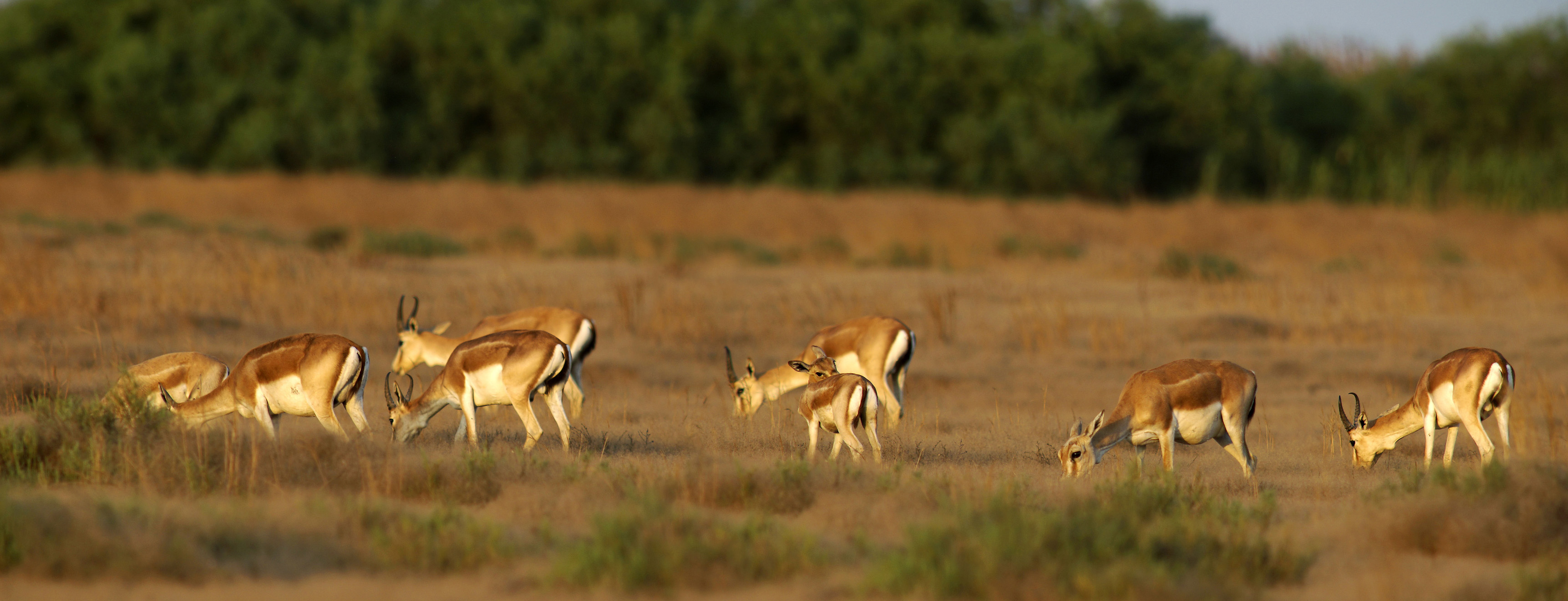 Şirvan Milli Parkı